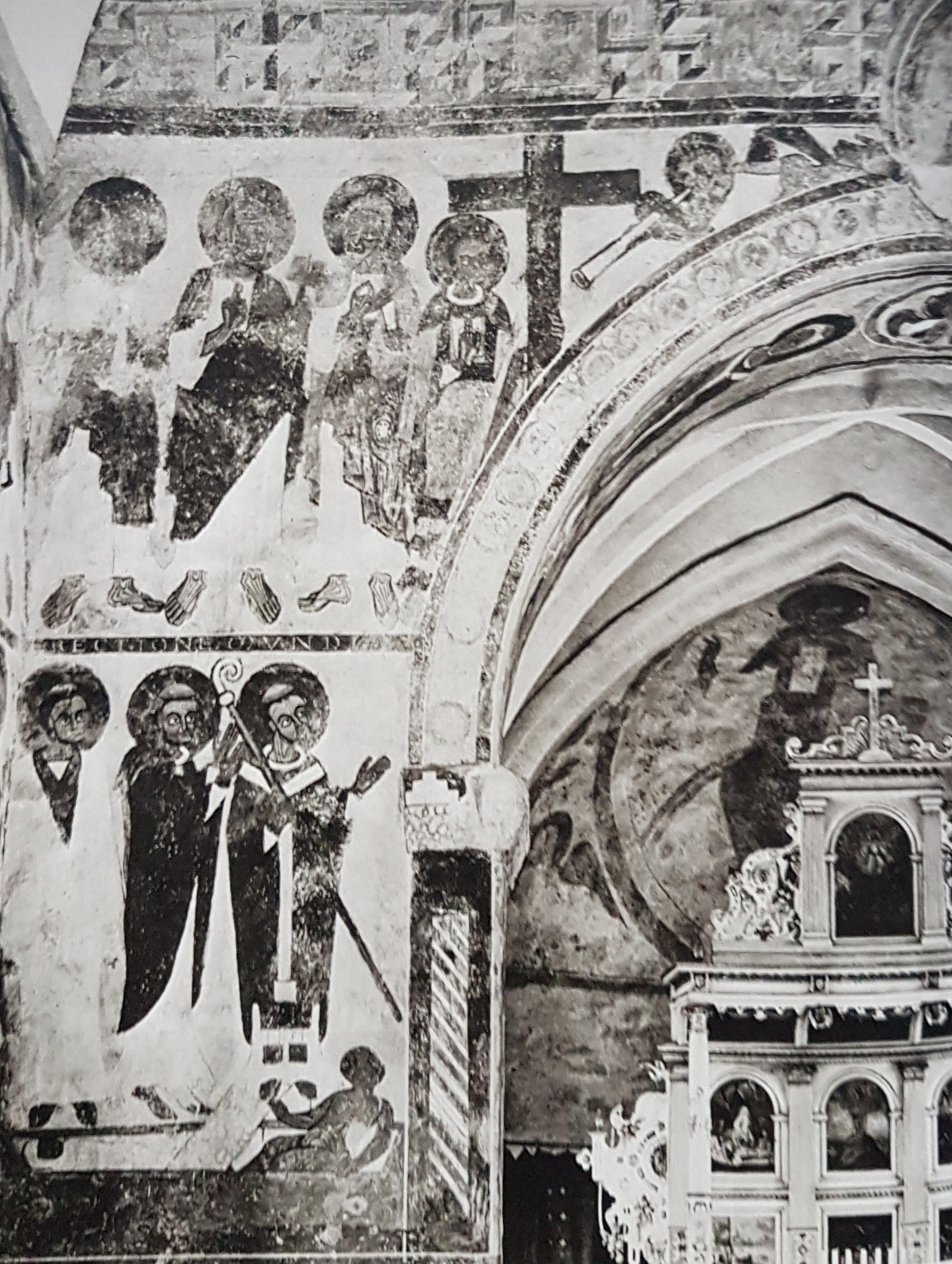 Väggmålningar i Finja kyrka utförda av Finjamästaren, avfotograferad porträttbild från Allhems Svenskt konstnärslexikon.